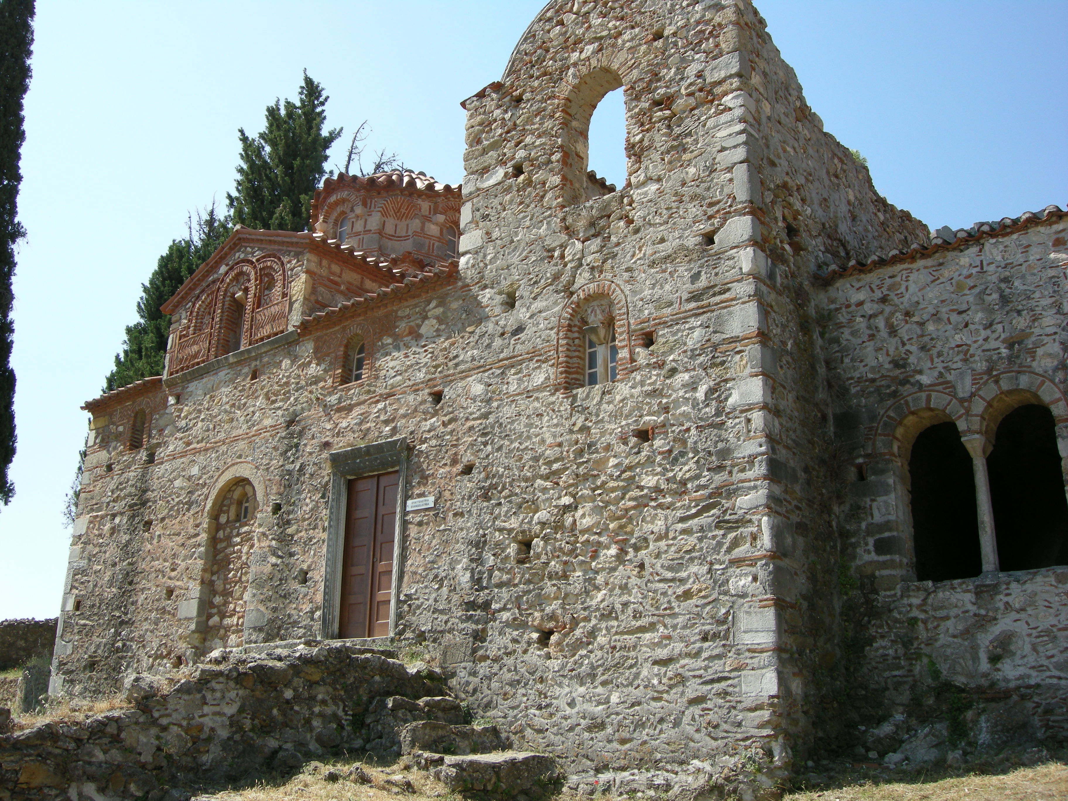 Evangelistria